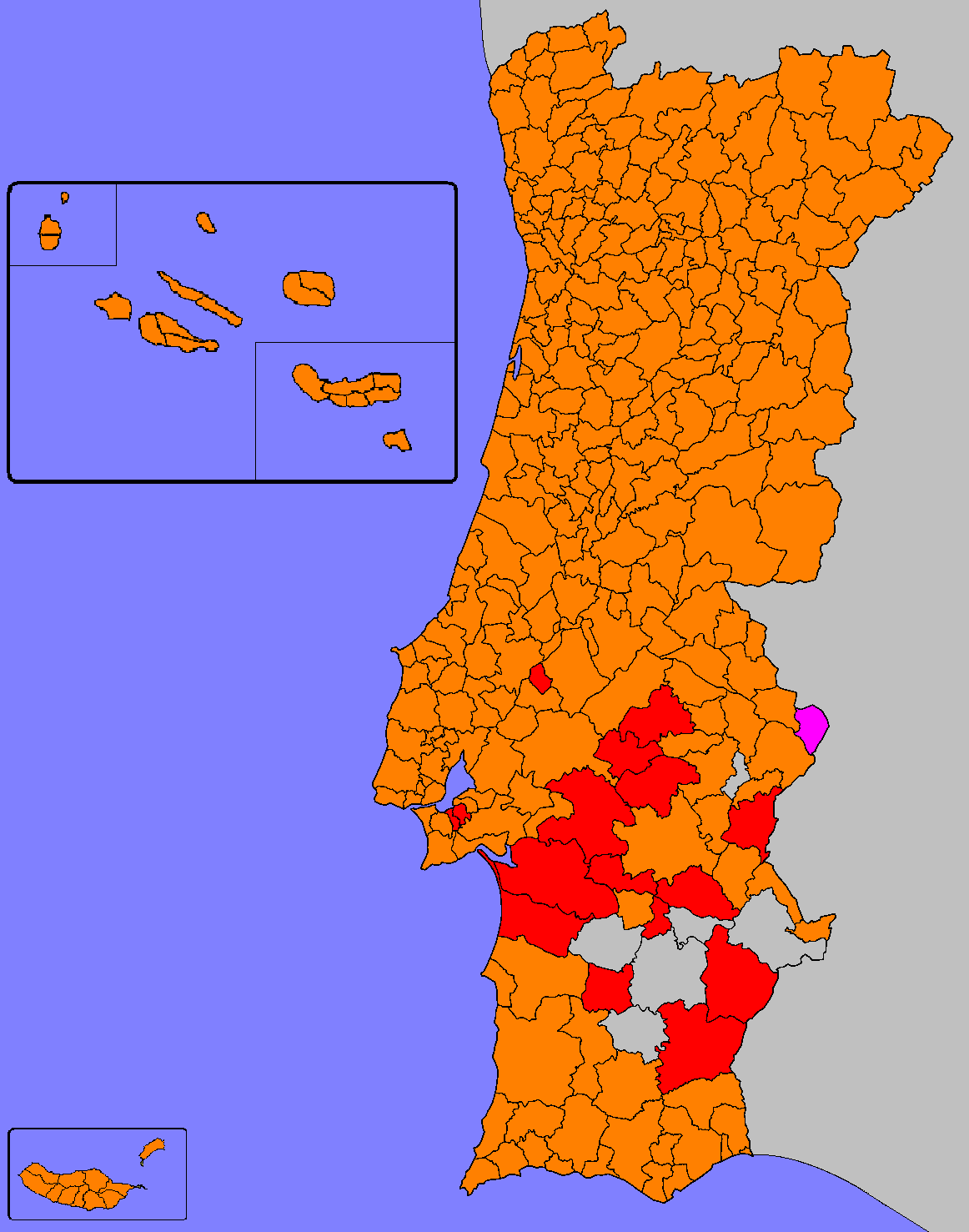 Mapa ilustrativo do candidato mais votado por Concelho